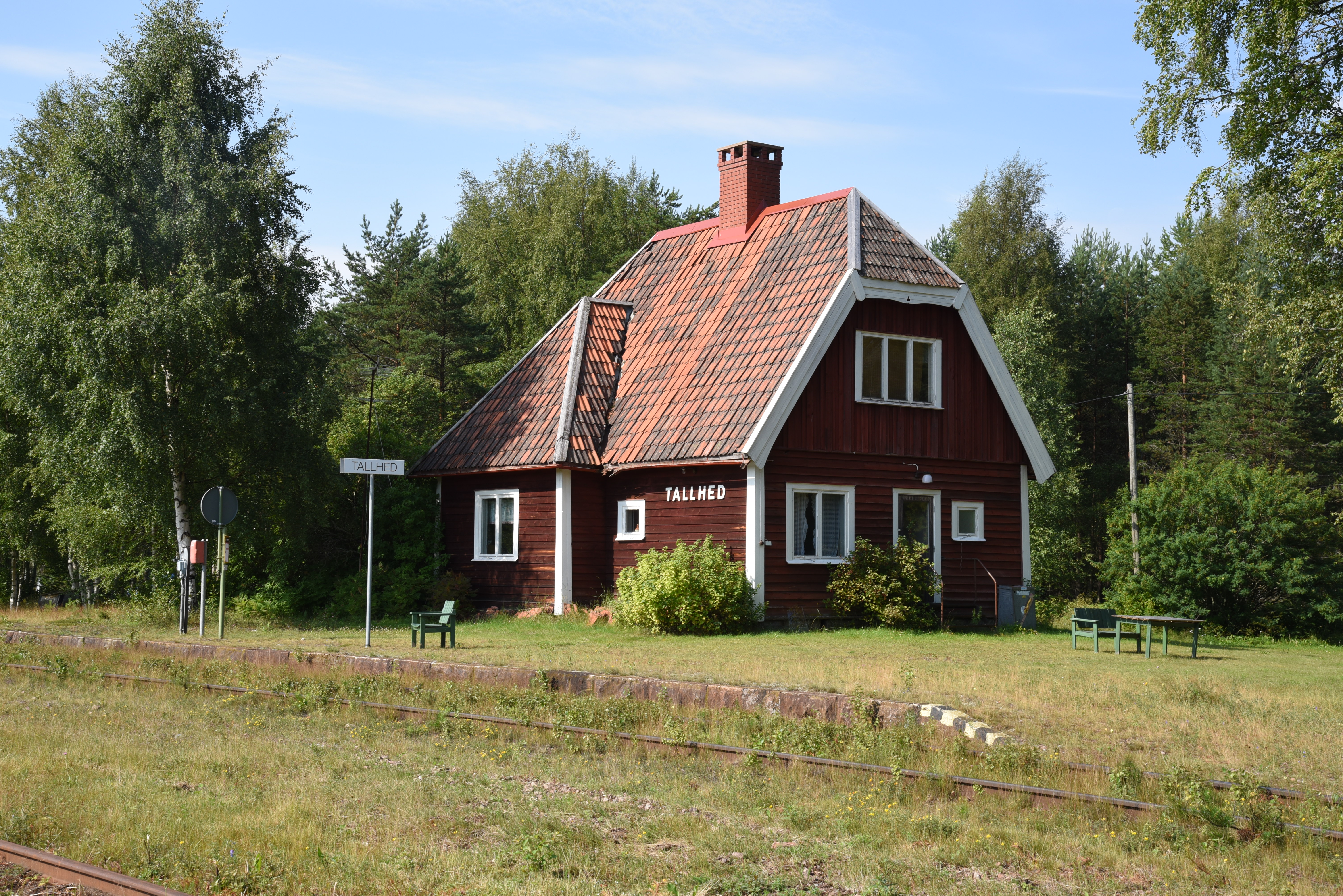 Stationshuset i byn Tallhed i Orsa kommun, längs Inlandsbanan.